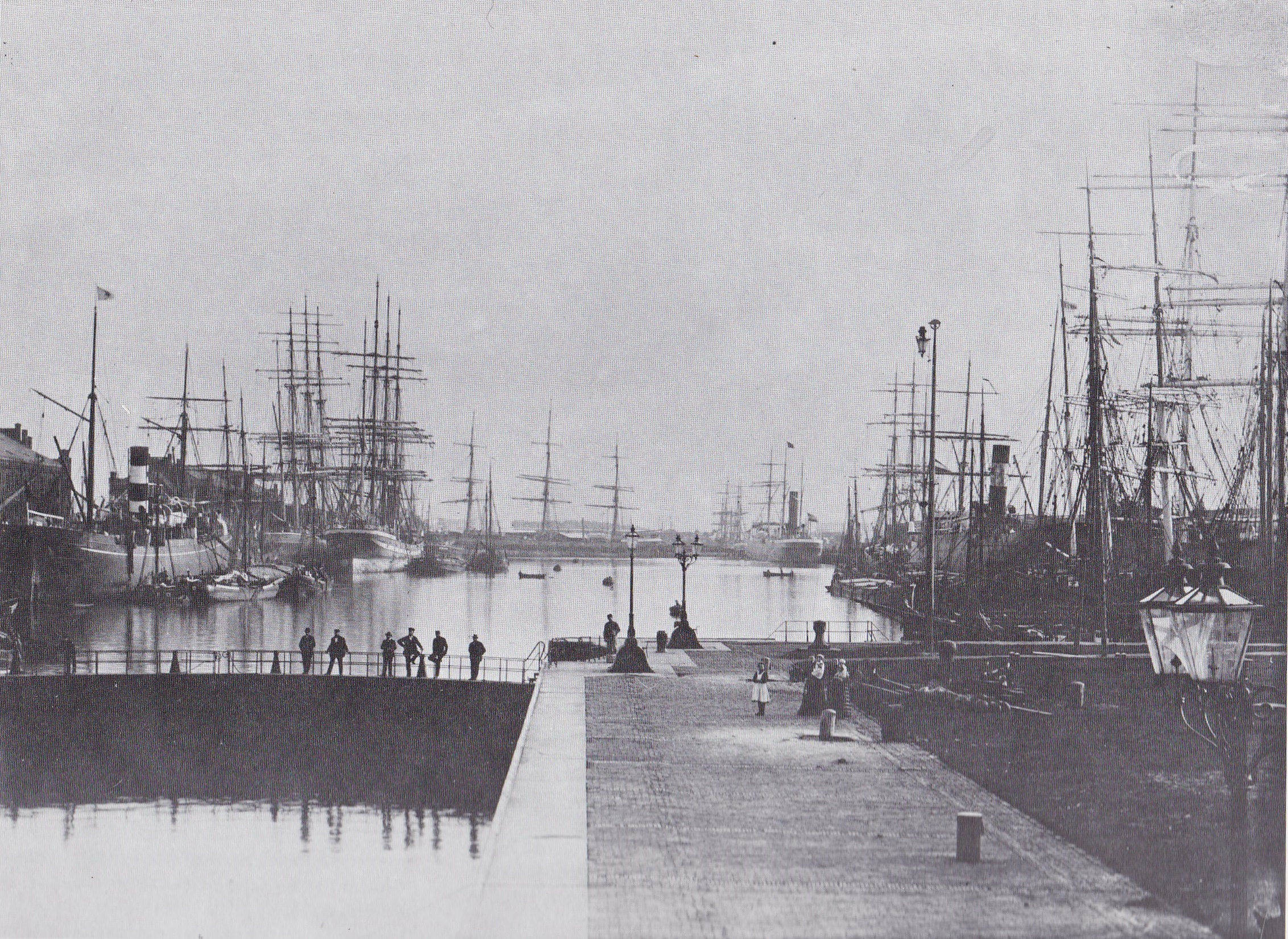 Handelshafen mit der alten Schleuse in Geestemünde; links (Ostseite) Reisclipper, rechts (Westseite) Petroleumclipper.